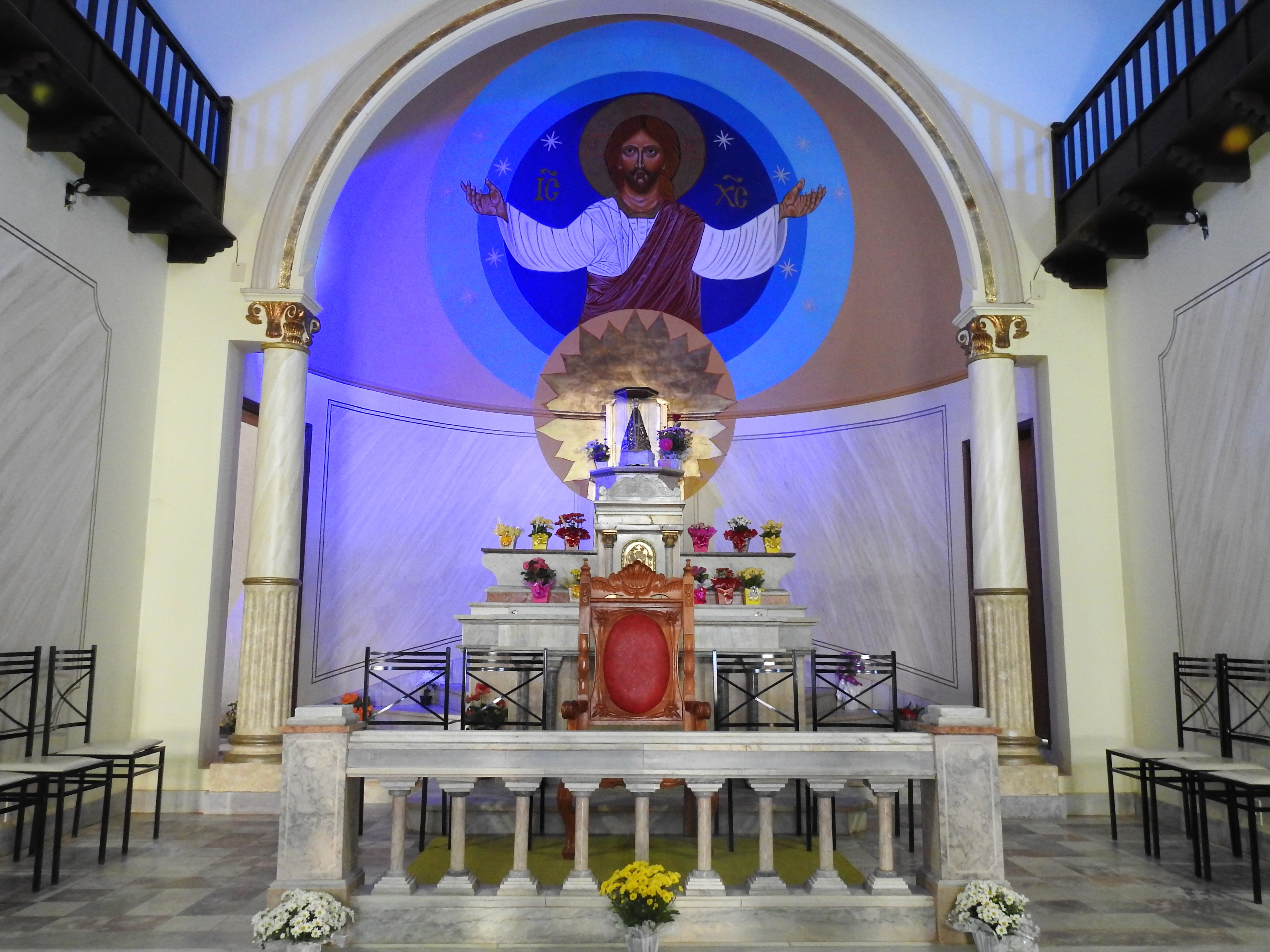 Santuário Nossa Senhora Aparecida da Babilônia ou Aparecida da Babilônia e também Aparecidinha, está localizado no município de São Carlos, na Estrada Municipal Leôncio Zambel, com acesso pela Rodovia Dr. Paulo Lauro (SP-215) no km 136 e pertence à Paróquia Santa Isabel. O Santuário possui, uma Capela, sala de milagres, espaço para eventos e centro de convenções, está subordinado à paróquia de Santa Isabel.